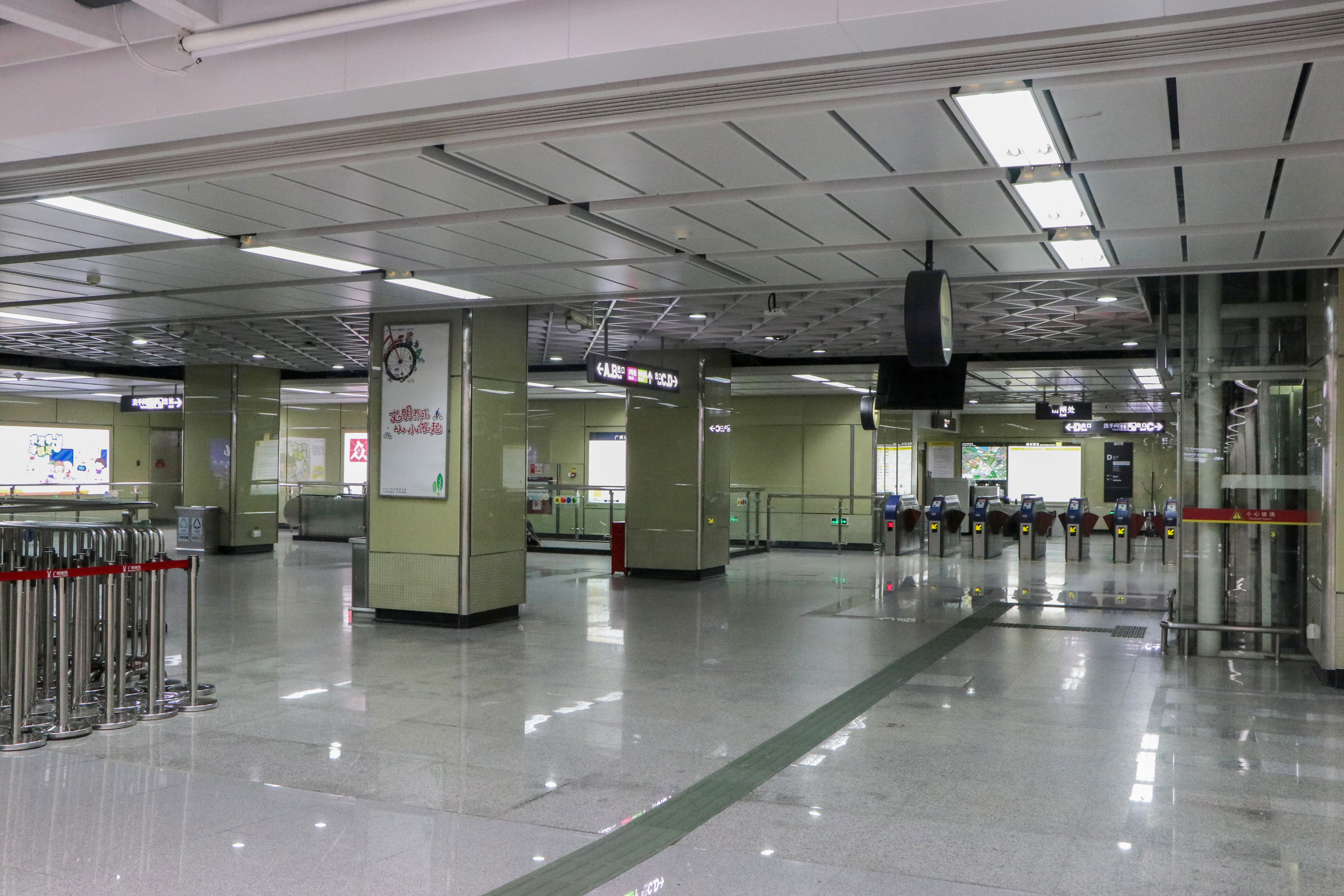 广州地铁鱼珠站